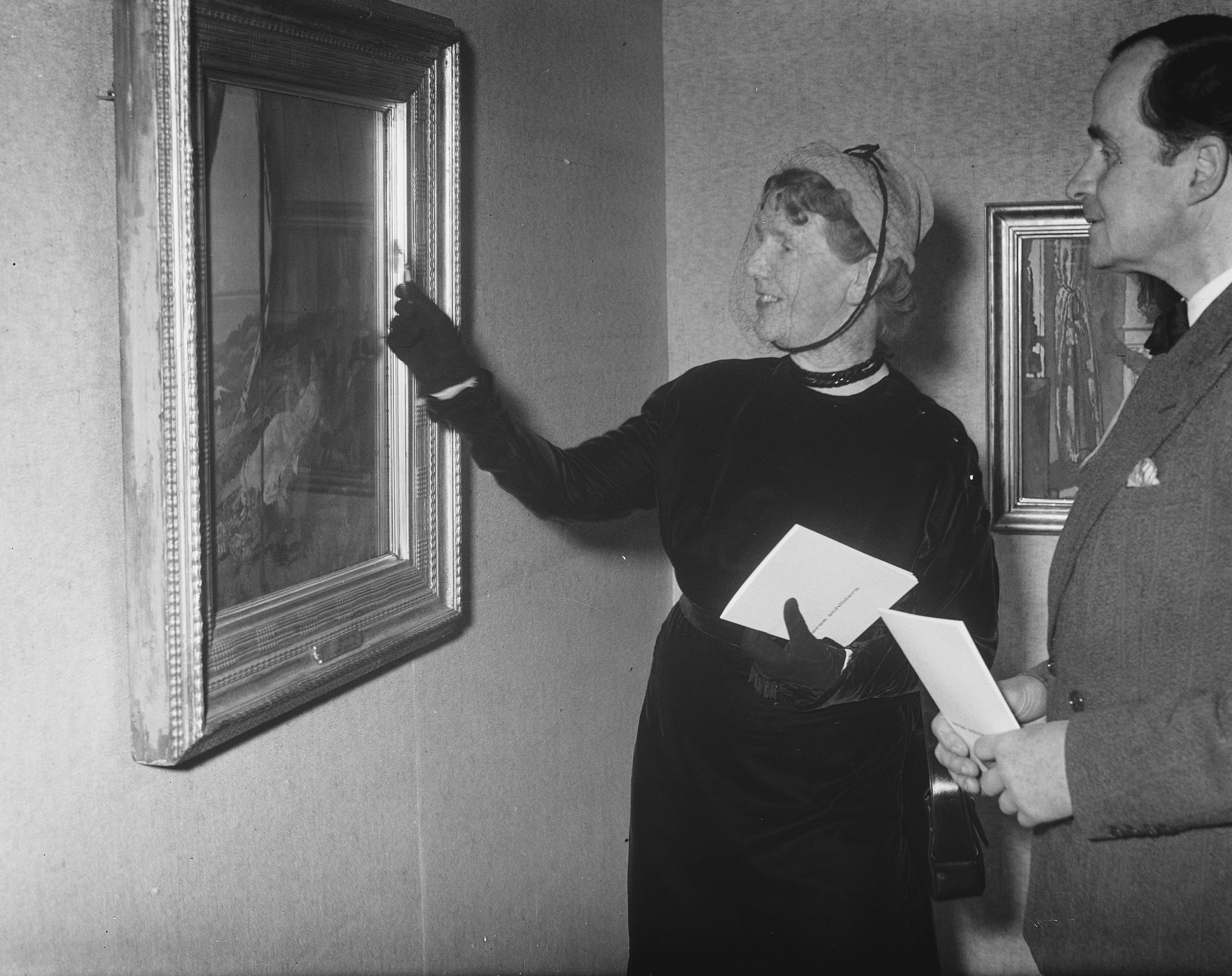 Josephine McNeill (gezante van Ierland aan het Nederlandse hof) opent Ierse tentoonstelling in Stedelijk Museum. Rechts Adriaan Roland-Holst